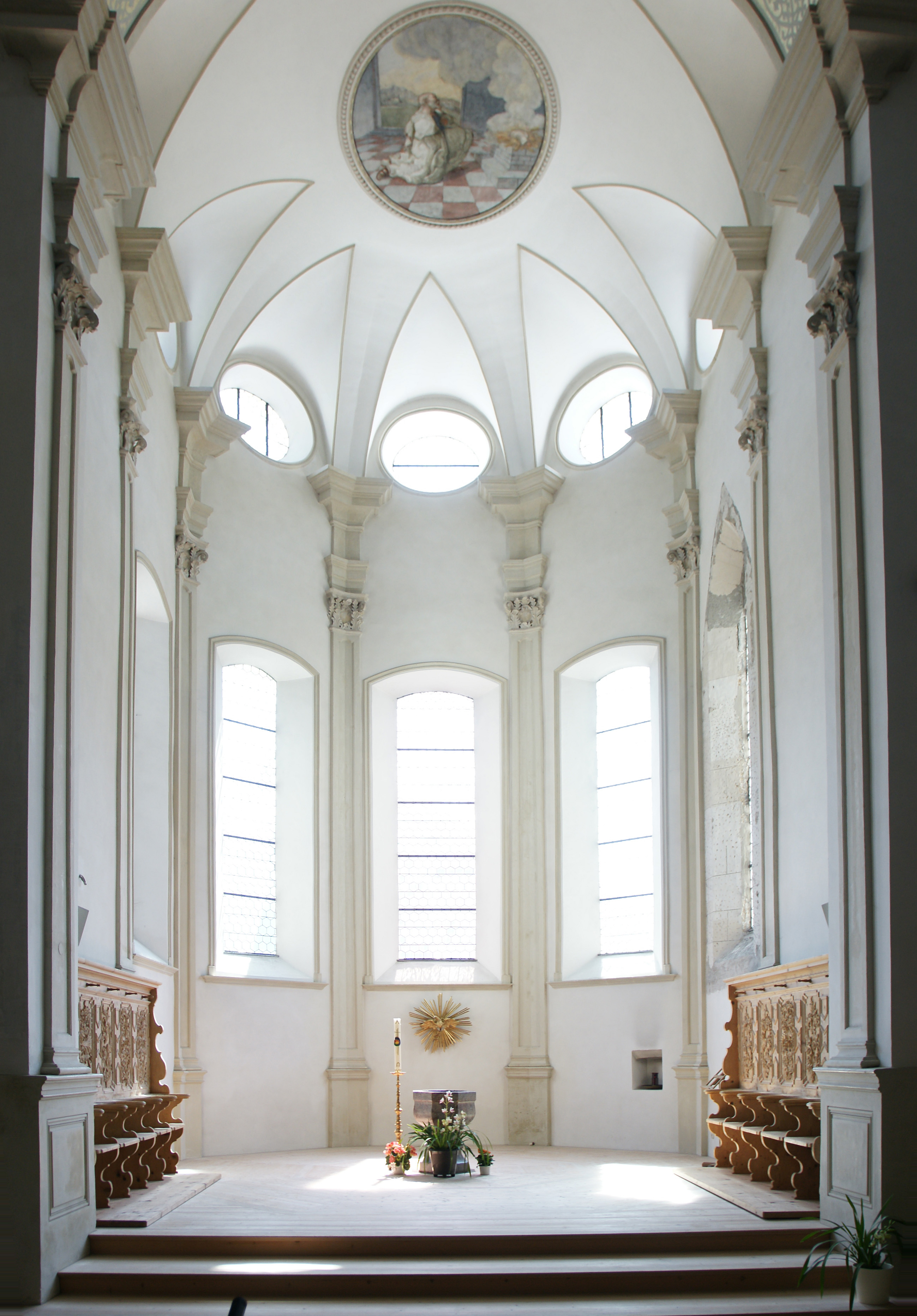 Pfarrkirche ‘Unsere Liebe Frau Mariä Geburt’, Tschagguns im Montafon. Gotischer Chor aus dem Jahr 1454 erhalten. Diesen im Zuge eines umfassenden Erweiterungsausbau durch Johann Nepomuk Bitschnau in den Jahren 1812-1814 erhöht. Das Deckenfresko von Michael Anton Fuetscher, aus dem Jahre 1814 stellt das "Brandopfer" dar und wurde 1956 durch Hannes Bertele restauriert. Das 5 sitzige Chorgestühl an beiden Seiten trägt an den Rückfeldern ein Rankendekor und ist bezeichnet mit "H.P.I.L.D.MDCCLXV2.